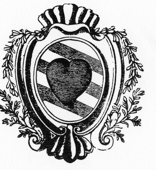 stemma del marchesato di Crevacuore (Piemonte)